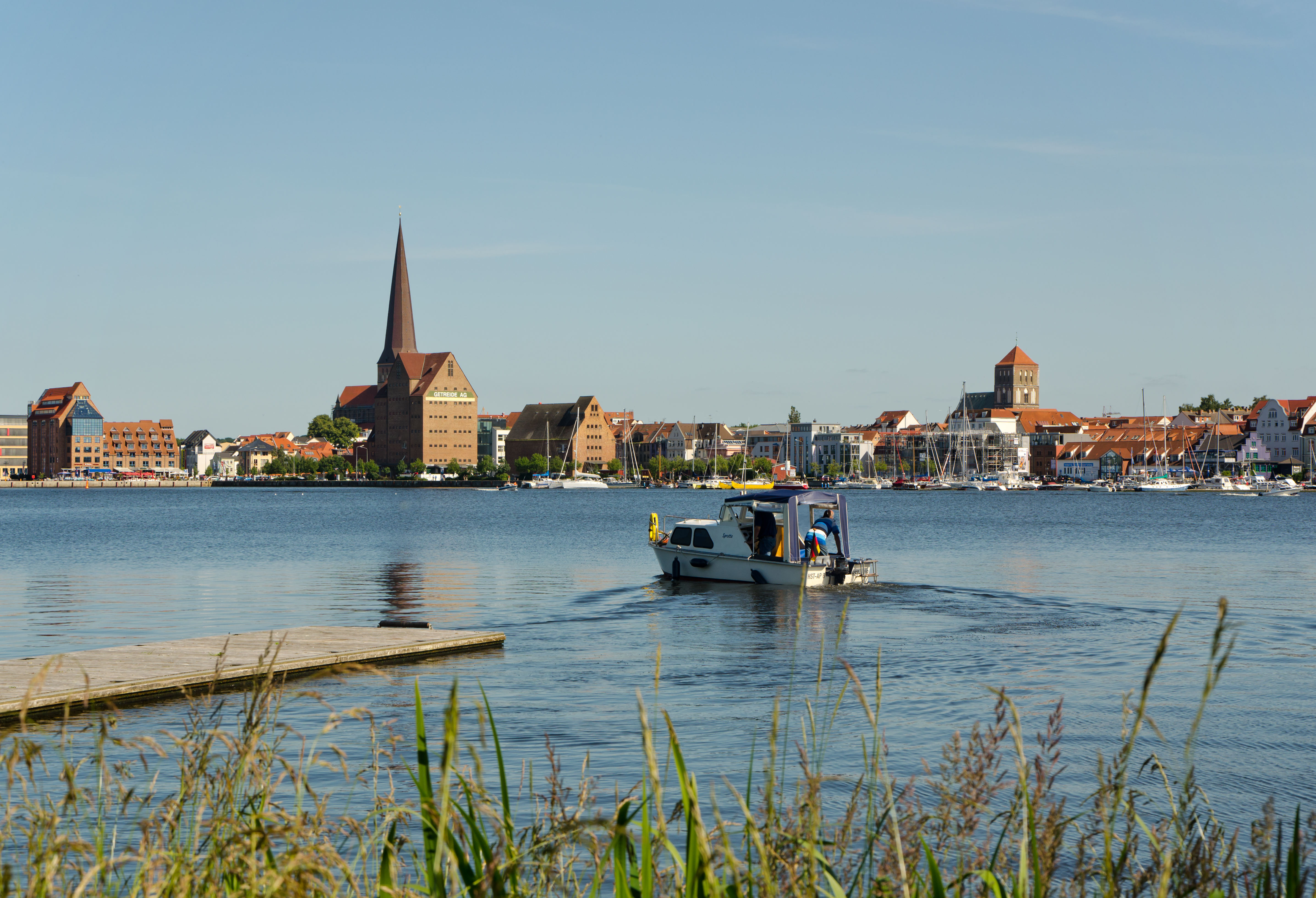 Rostock nördliche Altstadt vom gegenüberliegenden Warnowufer gesehen